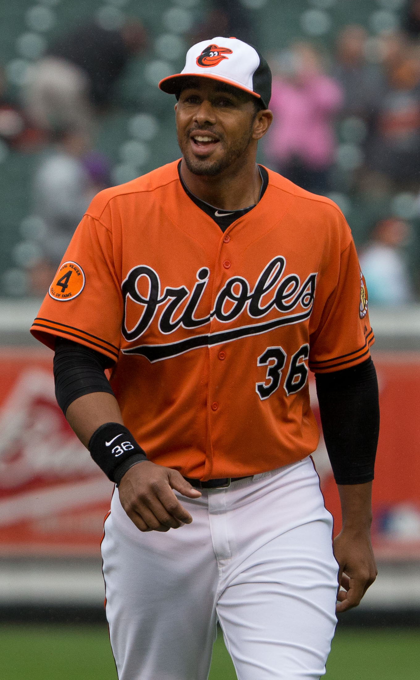 Chris Dickerson